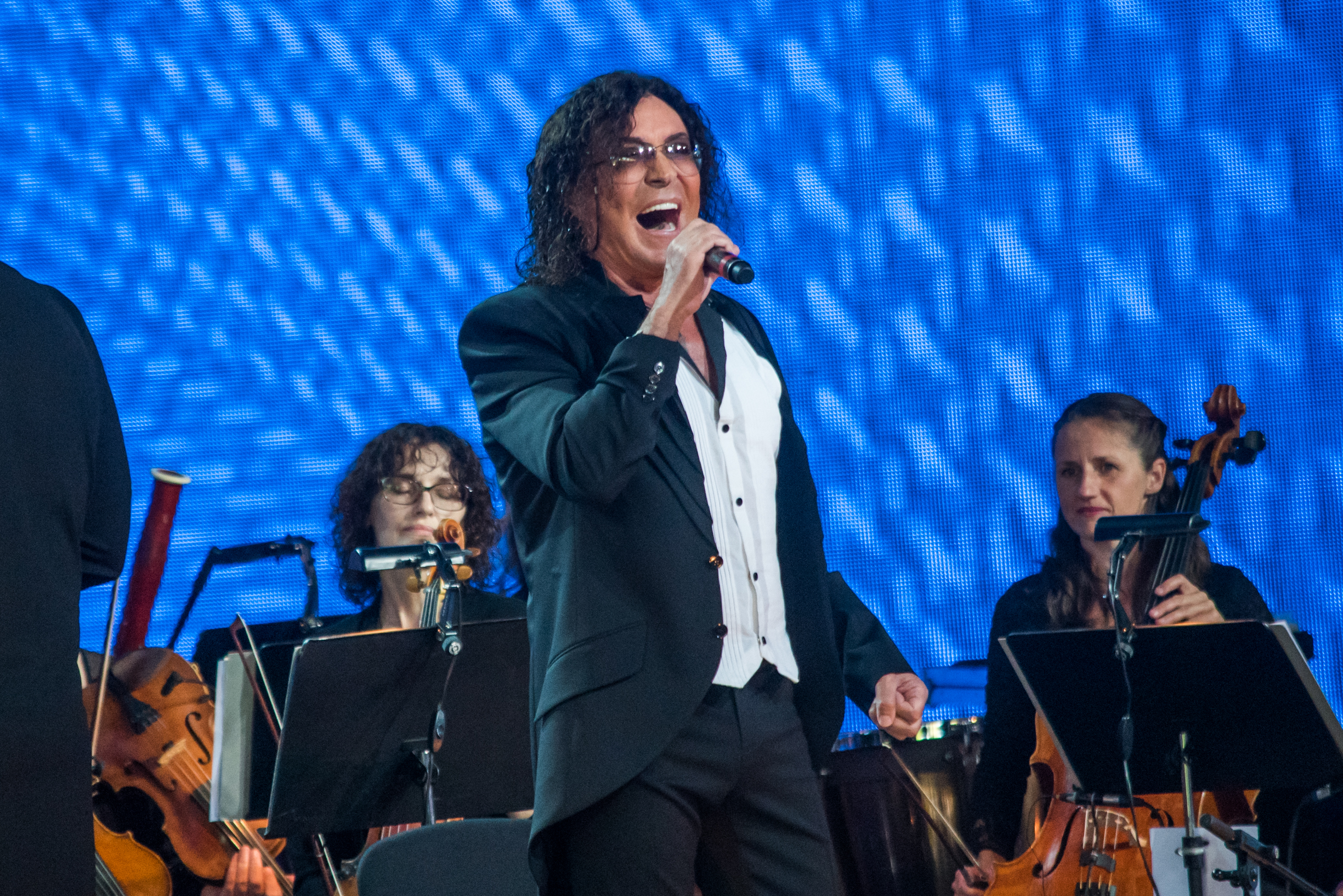 Валерий Леонтьев на фестивале «Лайма. Рандеву. Юрмала 2017»